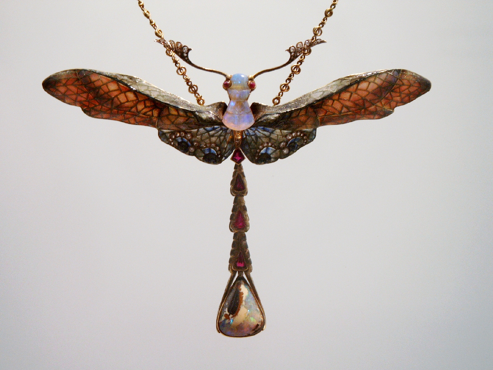 Libelle (1902) hanger en broche, ontwerp Philippe Wolfers, uitgevoerd in eimail, goud, robijn, opaal en briljant (privécollectie)